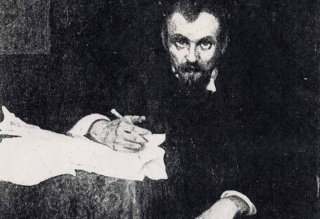 Victor Hadwiger (1878 - 1911), Český básník a spisovatel.